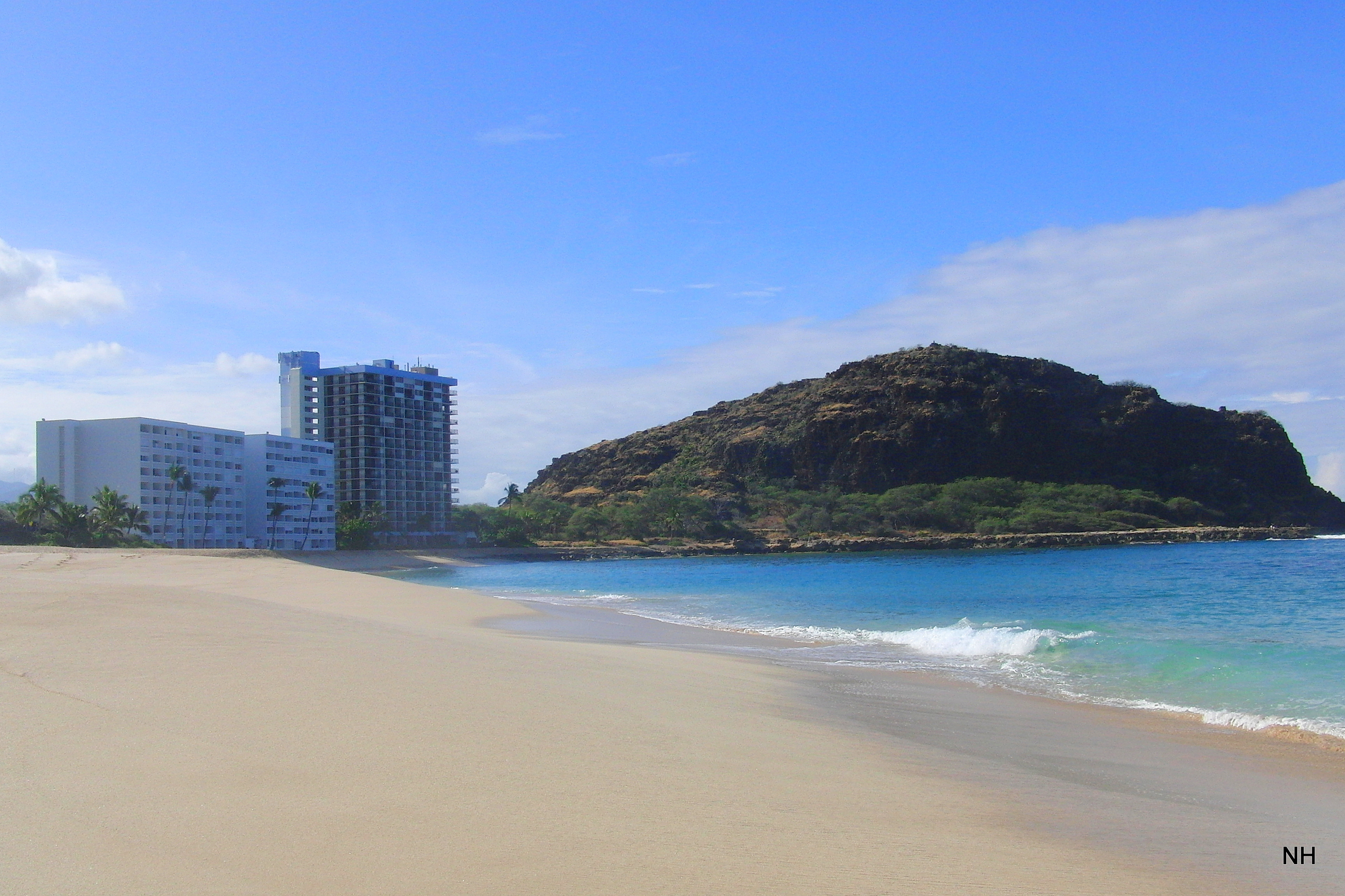 Mauna Lahilahi: 230 feet high